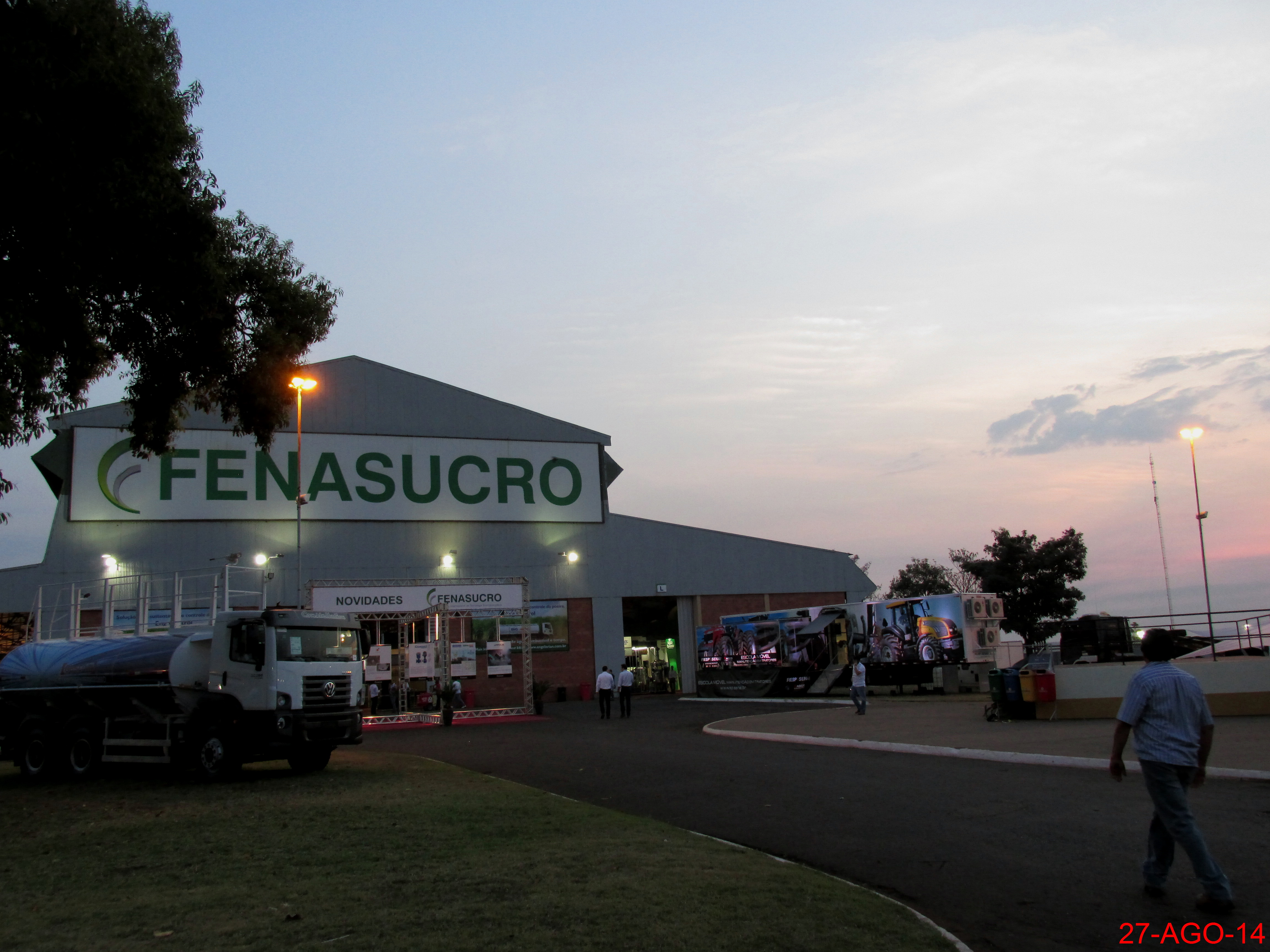 Entardecer na FENASUCRO em Sertãozinho. O evento é a maior feira do setor sucroenergético, reunindo empresas de armazenamento, agricultura, produção industrial, caldeiraria, automação, logística, equipamentos de segurança, serviços e energias renováveis.